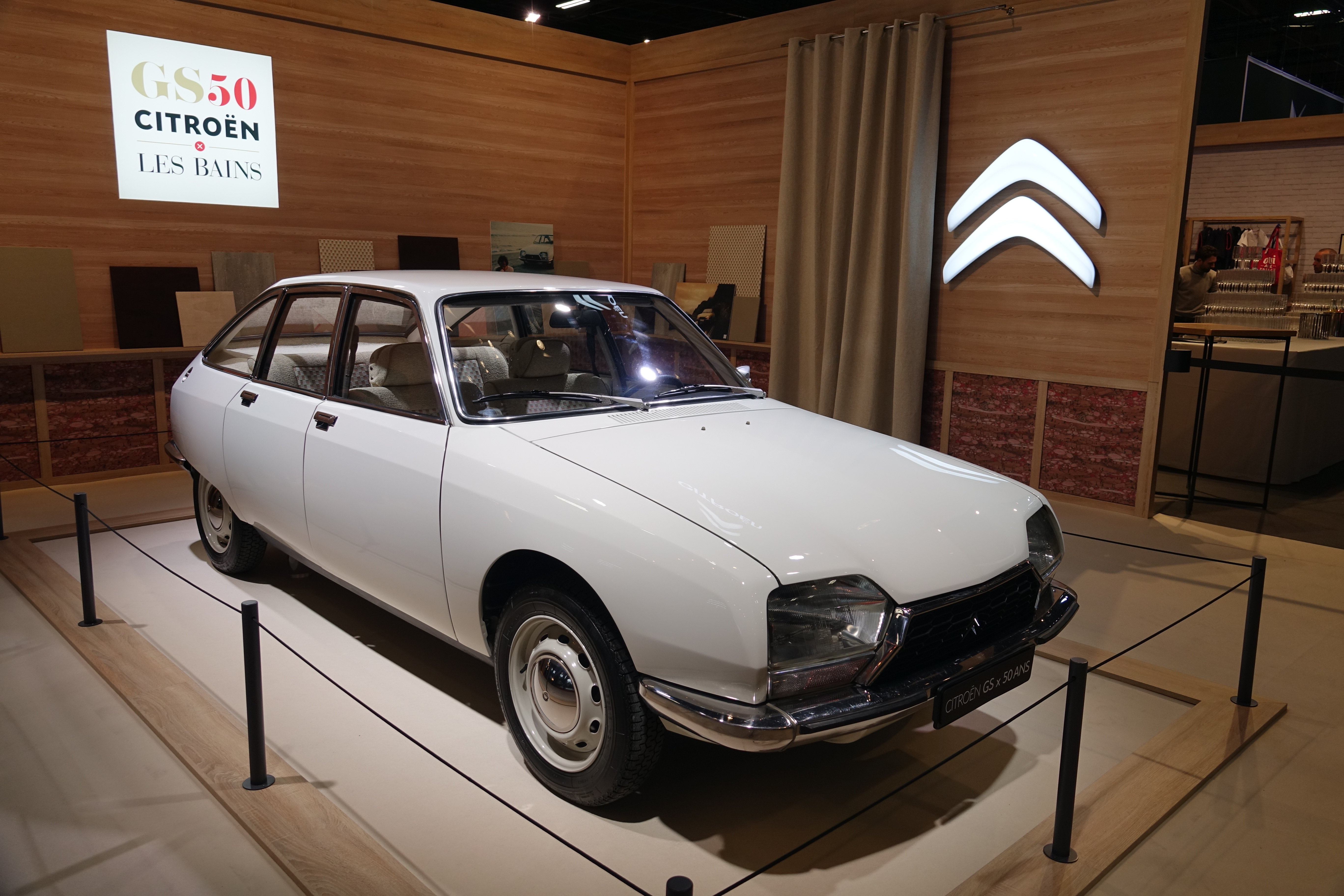 50 ans de la GS - Rétromobile 2020